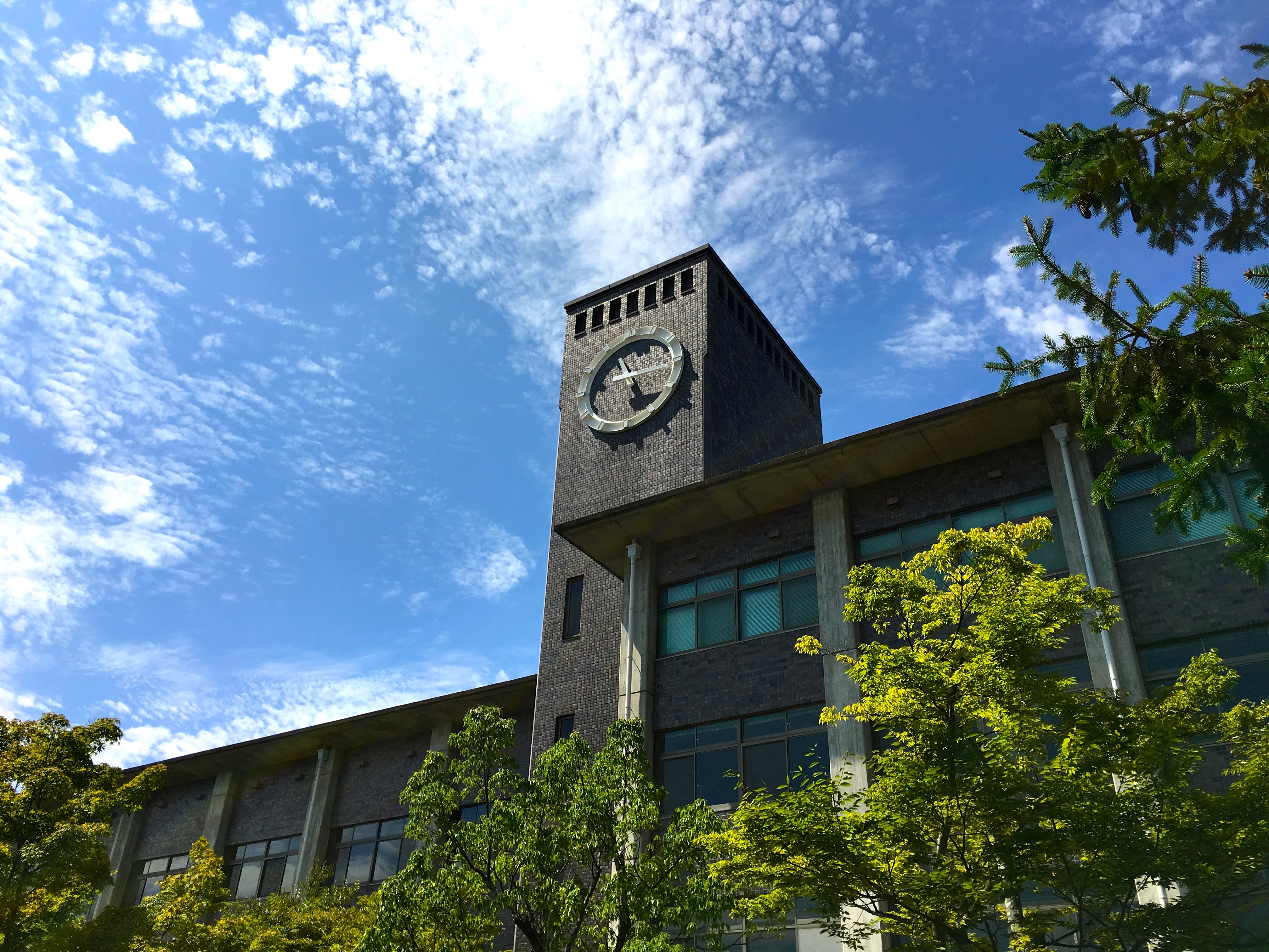 The photo was taken by me on September 10, 2016.